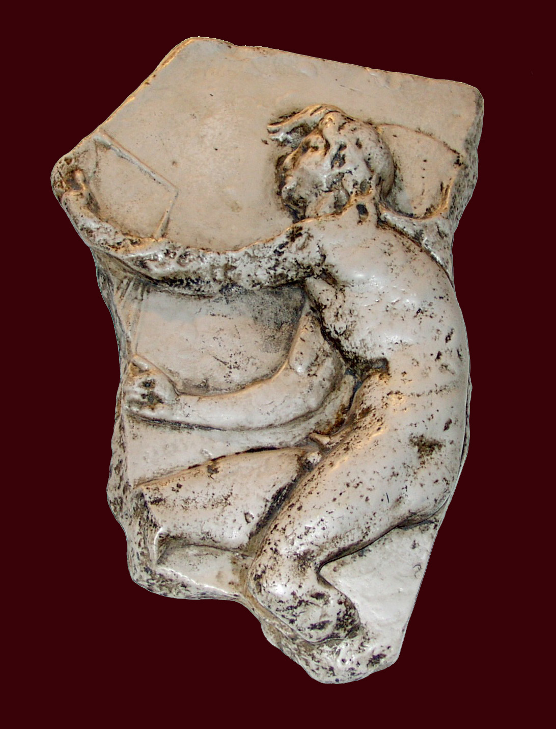 Eigenes Foto einer eigenen Kopie (von 1974) der im Kreuzgang des Johannesklosters von Trogir ausgestellten antiken Kopie des Kairos-Reliefs von Lysippos, der es im 4. Jahrhundert vor Christus für die Palästra in Olympia schuf.